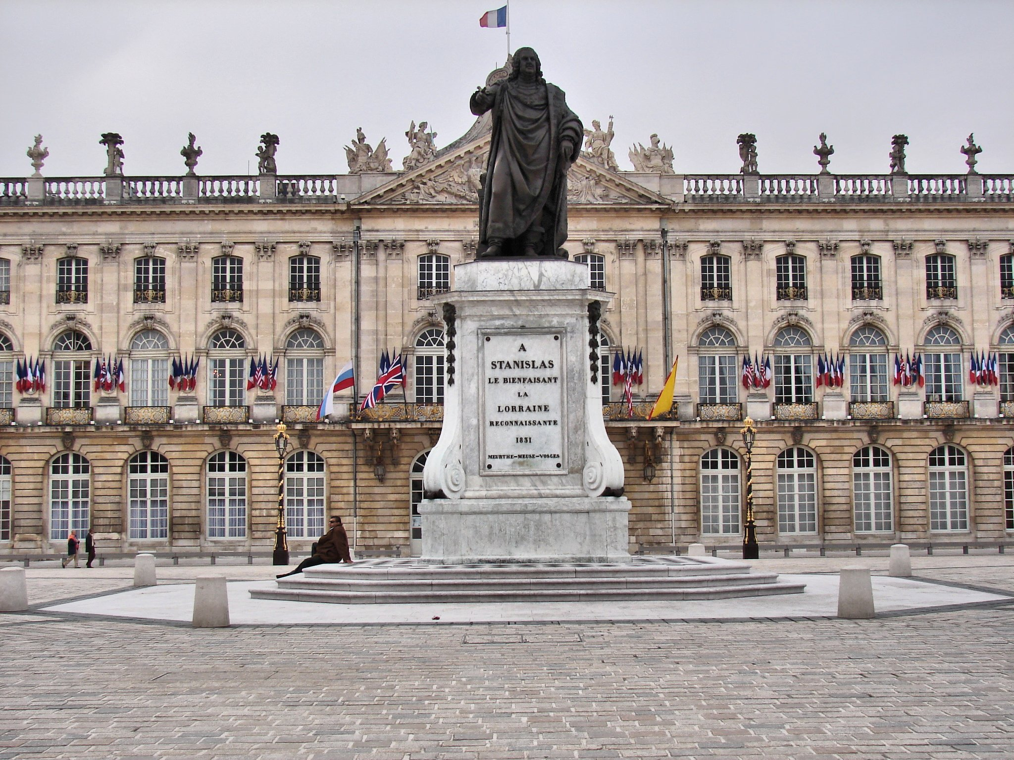 Nancy, Denkmal des Herzogs Stanislaw von Lothringen